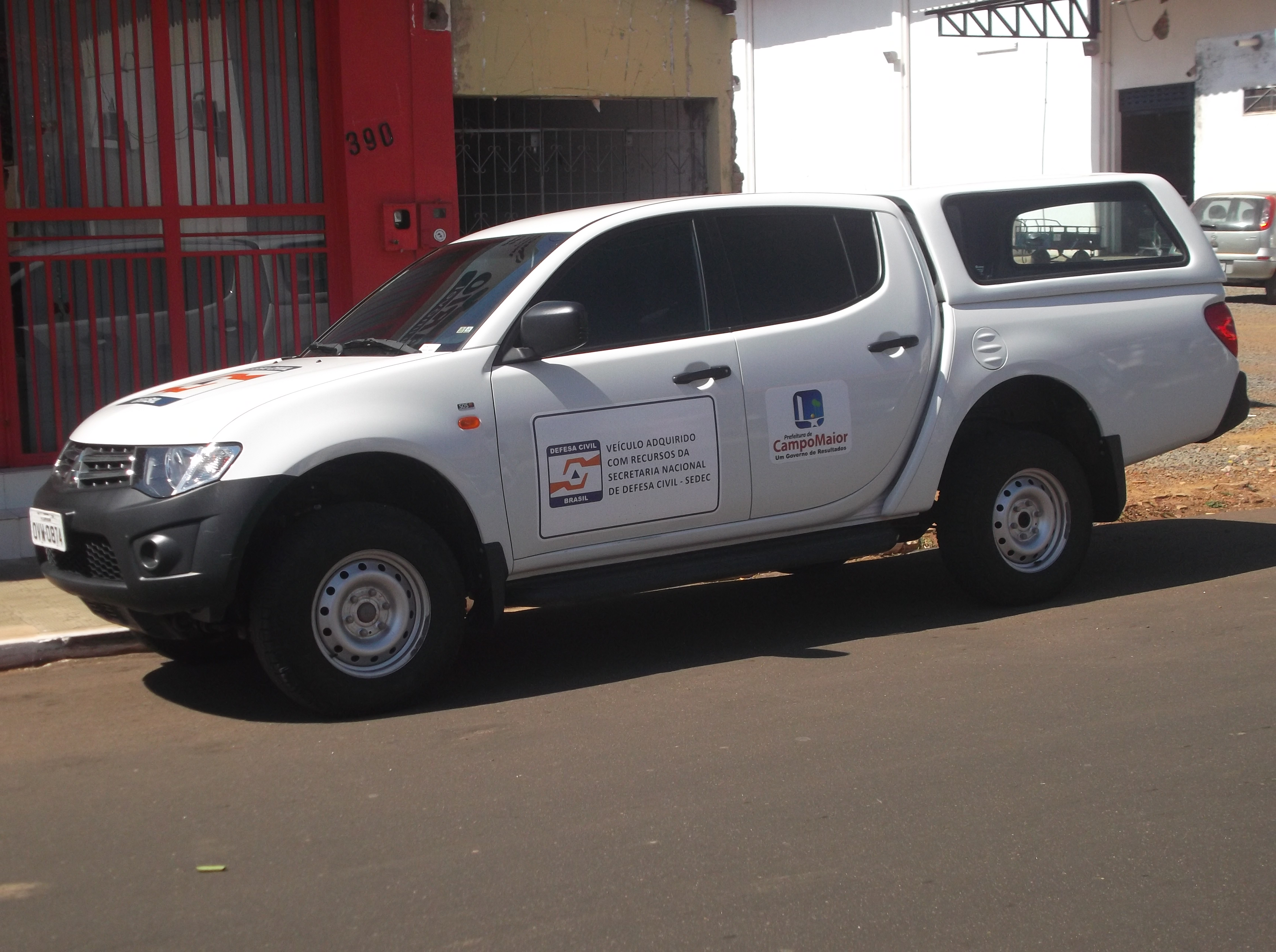 Veícolo de ente governamental do Brasil, prefeitura de Campo Maior (Piauí)e Defesa Civil do Brasil.